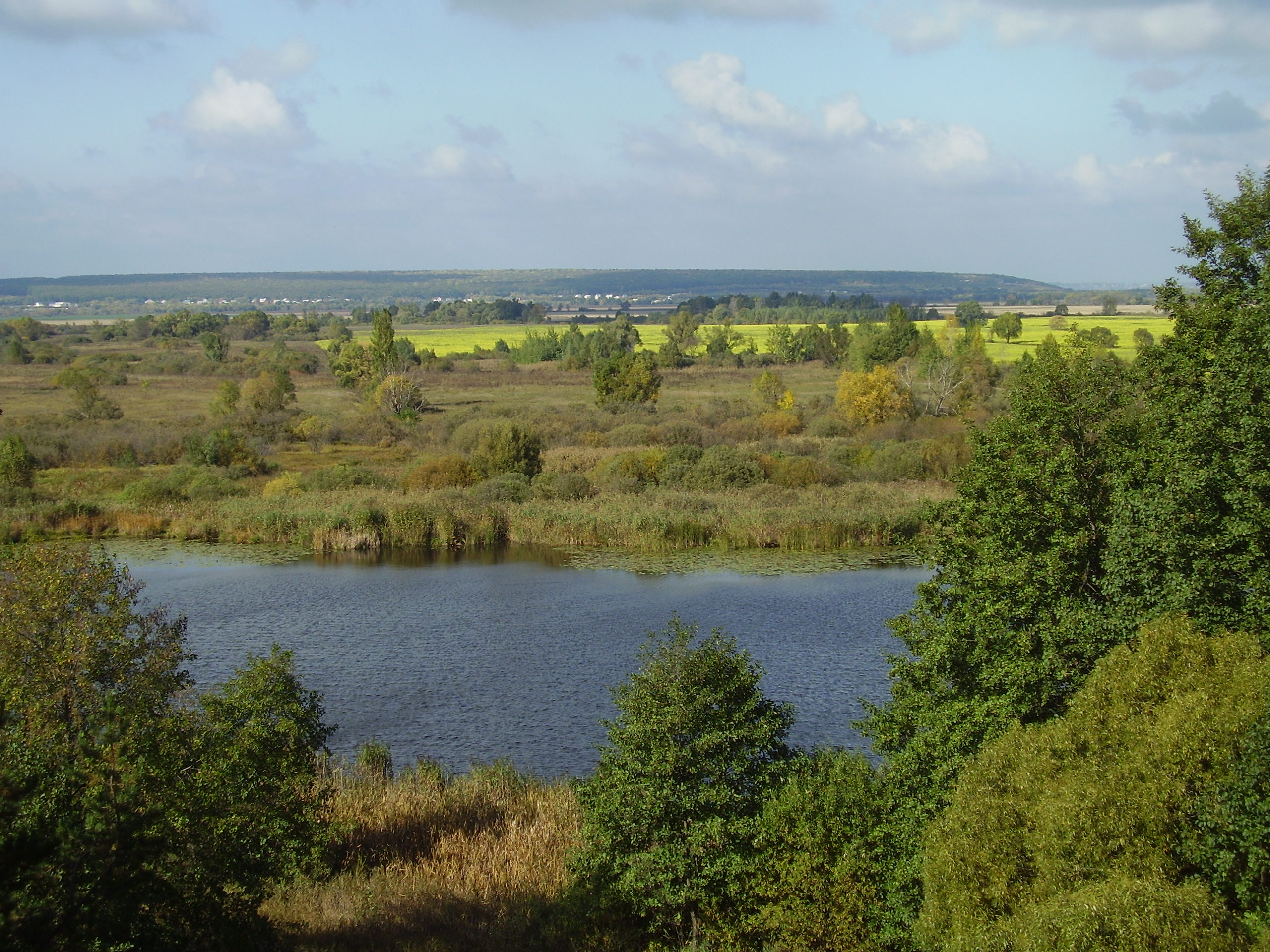 Большое озеро (Воронеж, Подклетное))